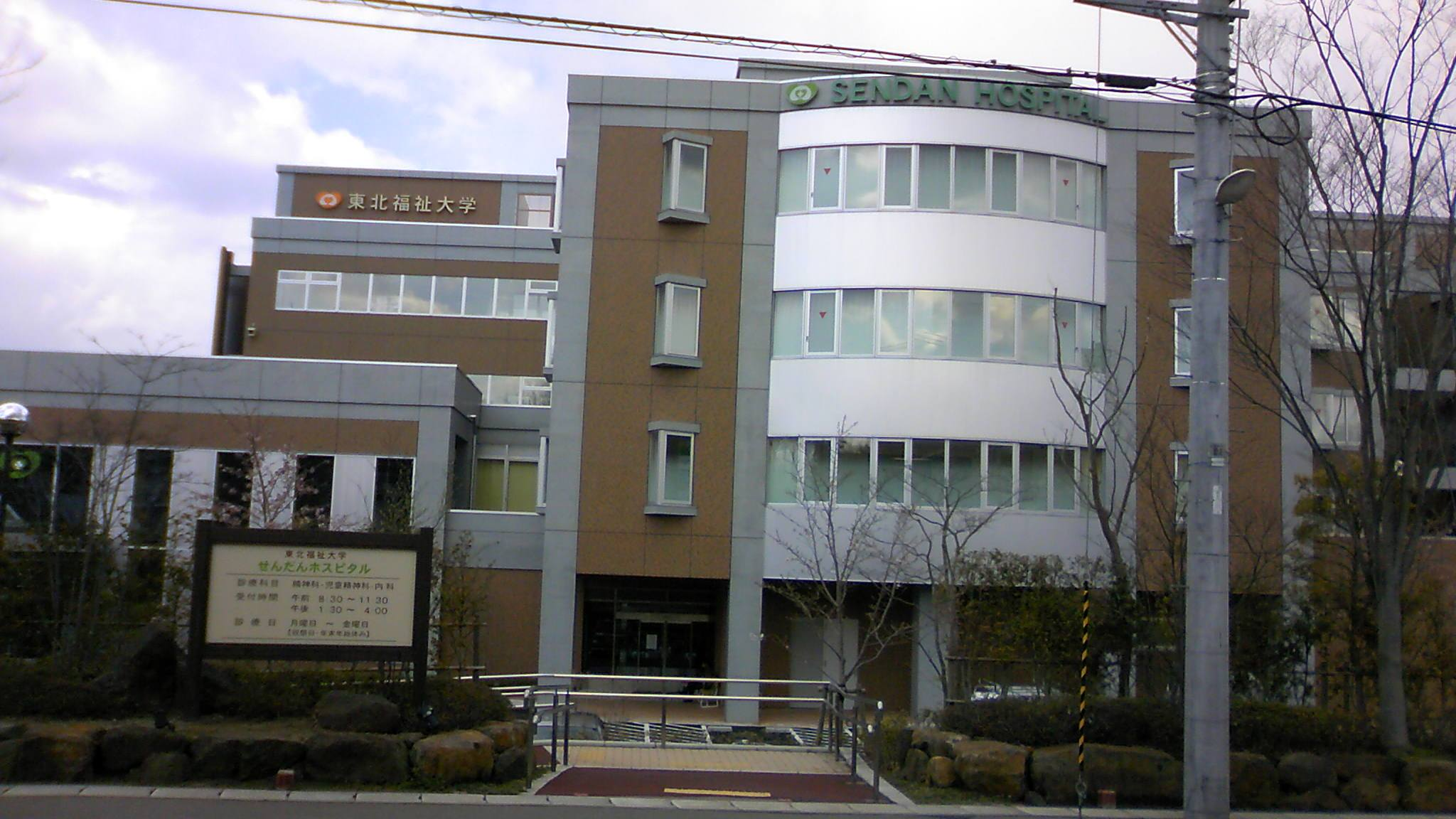 せんだんホスピタル